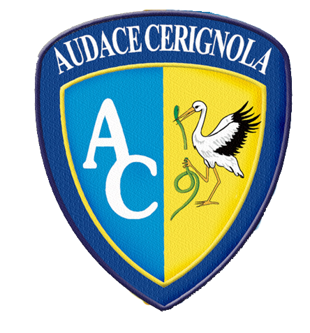 Logo dell'U.S.D. Audace Cerignola